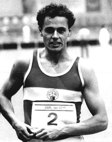 Jens Carlowitz ADN-ZB Weisflog 27.2.88 Senftenberg: 25. DDR-Hallenmeisterschaften der Leichtathleten - Jens Carlowitz, der eine hundertstel Sekunde langsamer lief. Jens Carlowitz